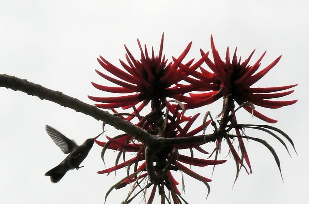 Lucky day